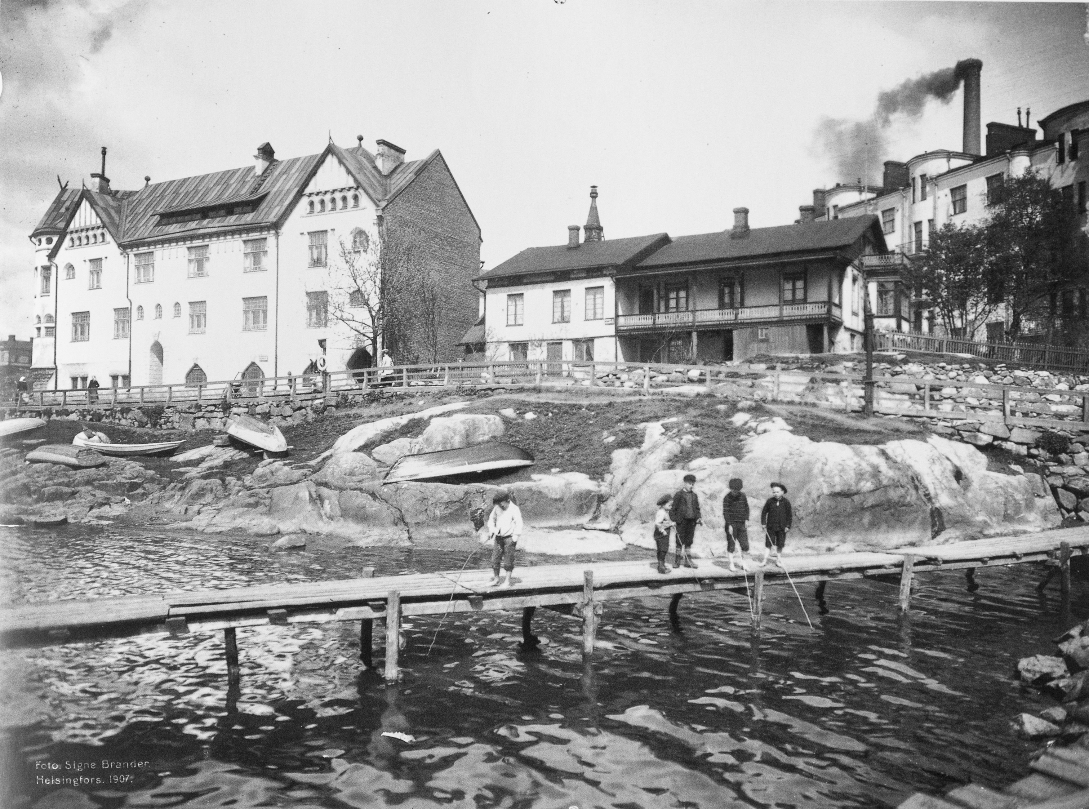 Poikia ongella Eläintarhanlahden laiturilla vuonna 1907.